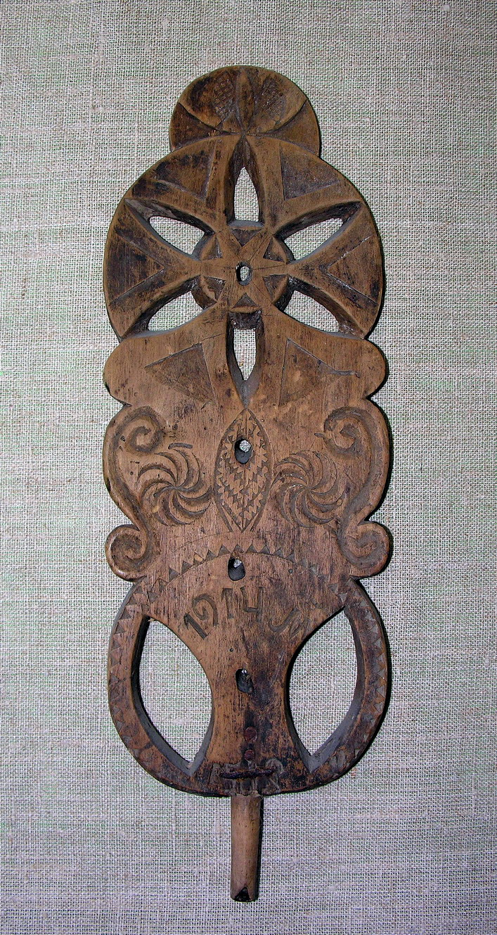 Prieverpstė 2008 m. kovo 4 d., Lietuva